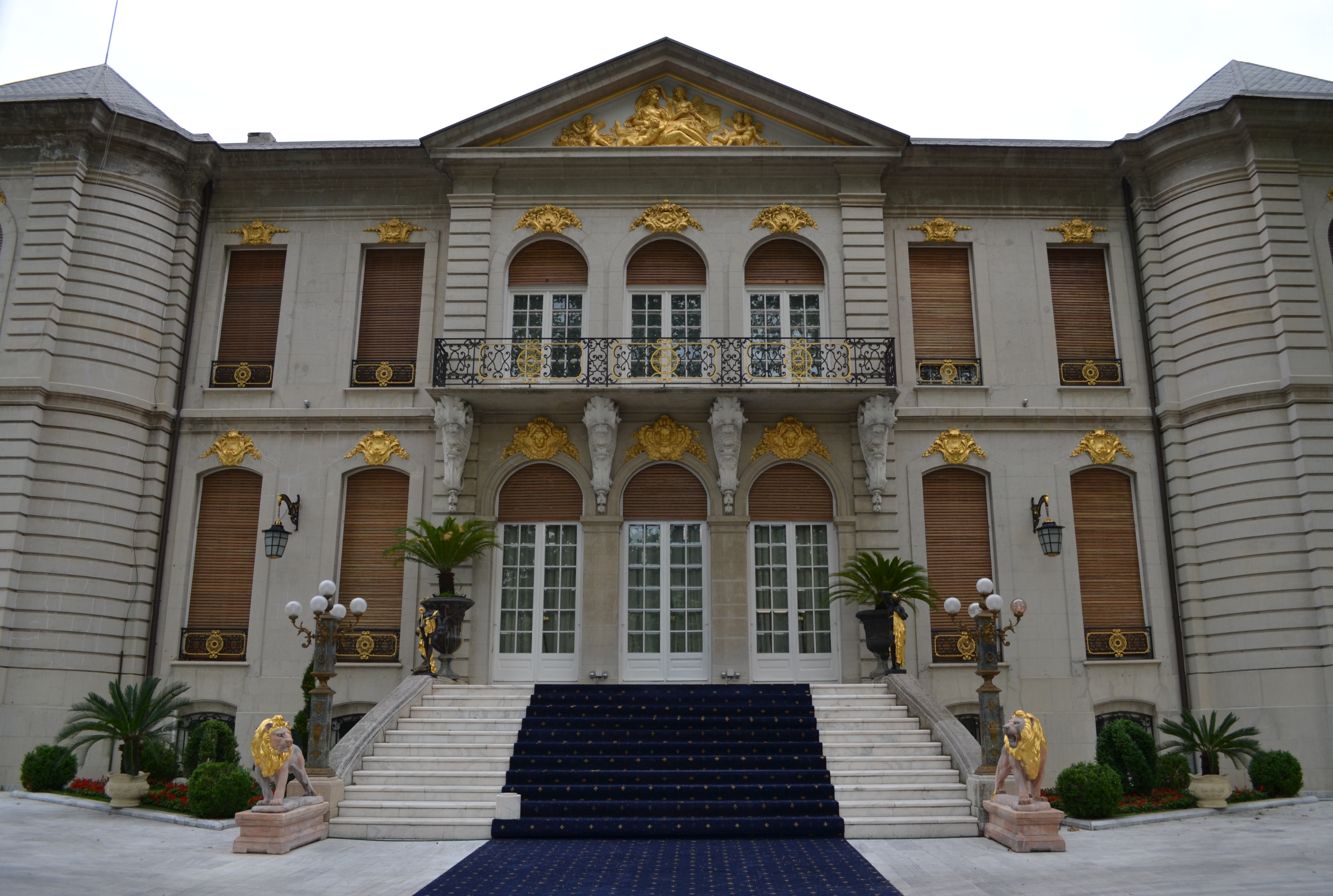 Casa Manu-Auschnitt, Aleea Alexandru nr. 1 / Aleea Modrogan nr. 2